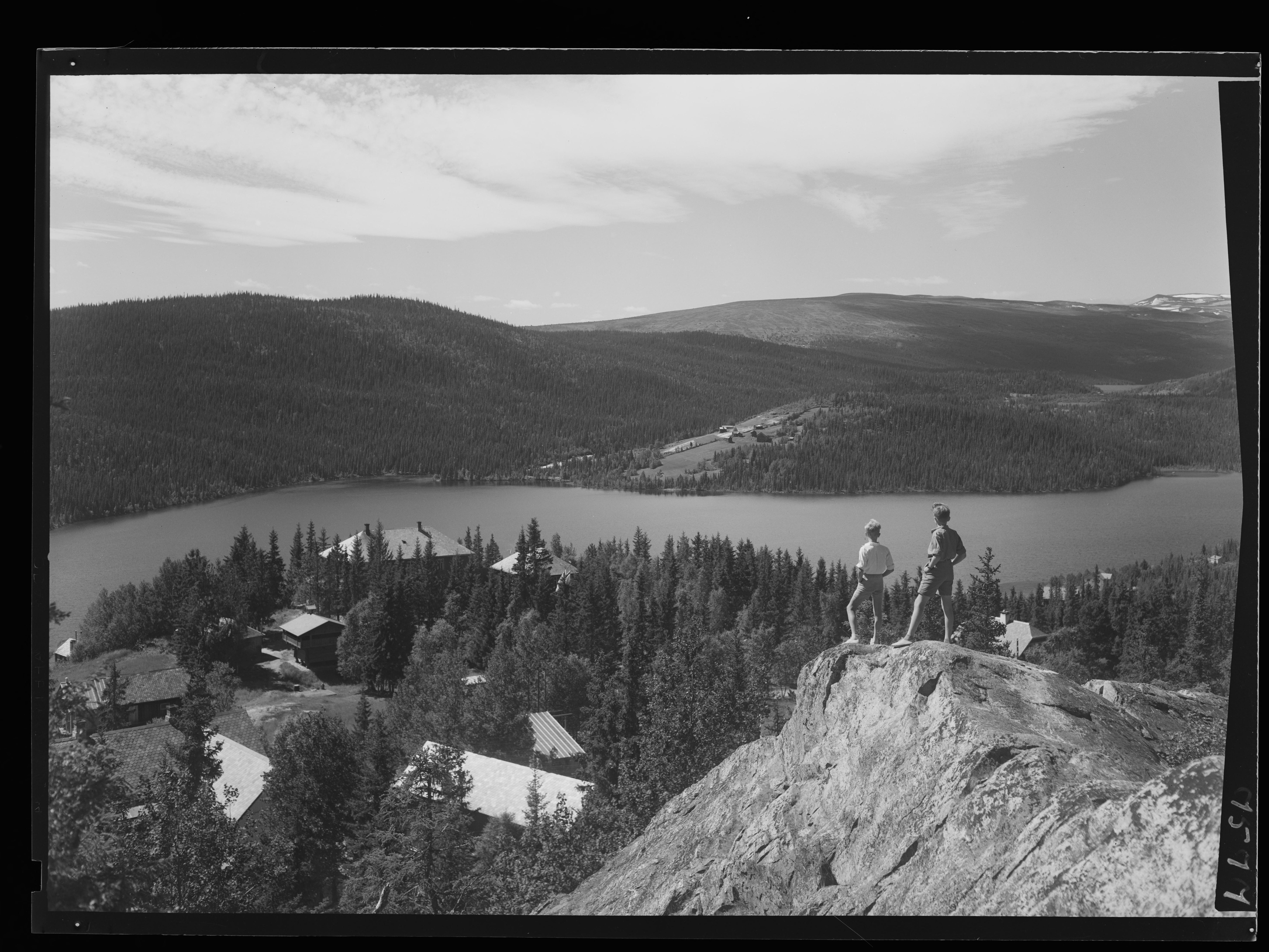 Bildet er hentet fra Nasjonalbibliotekets bildesamling Skammestein,Valdres, Øystre Slidre, Oppland